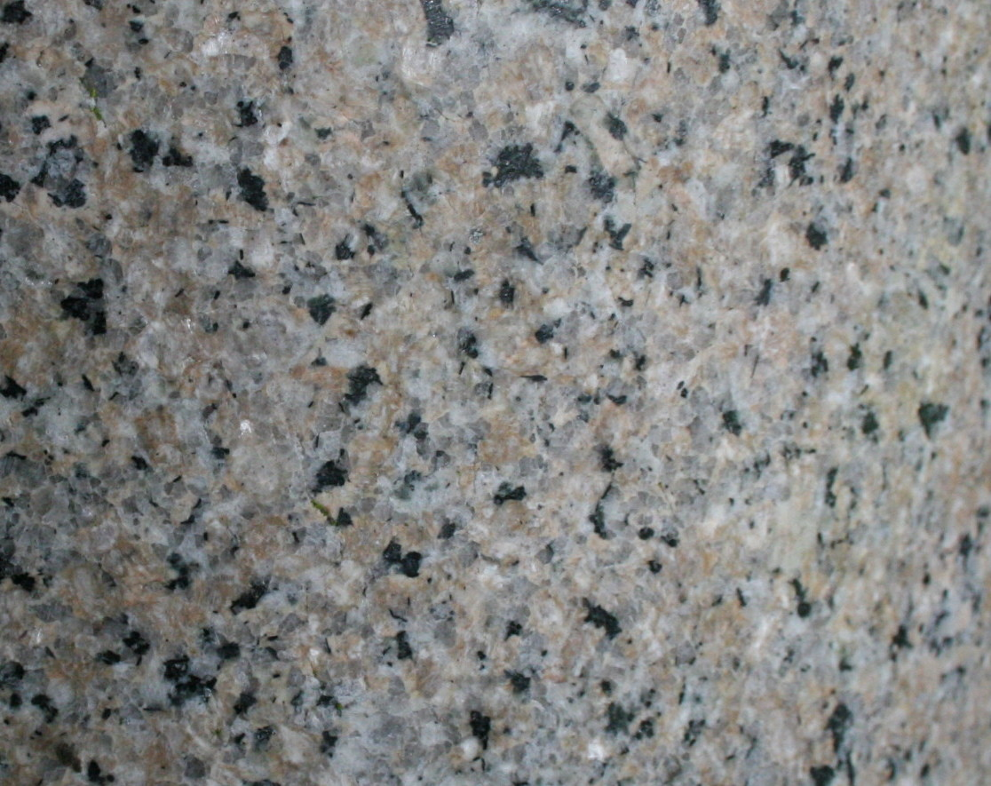 Wurberg-Granit